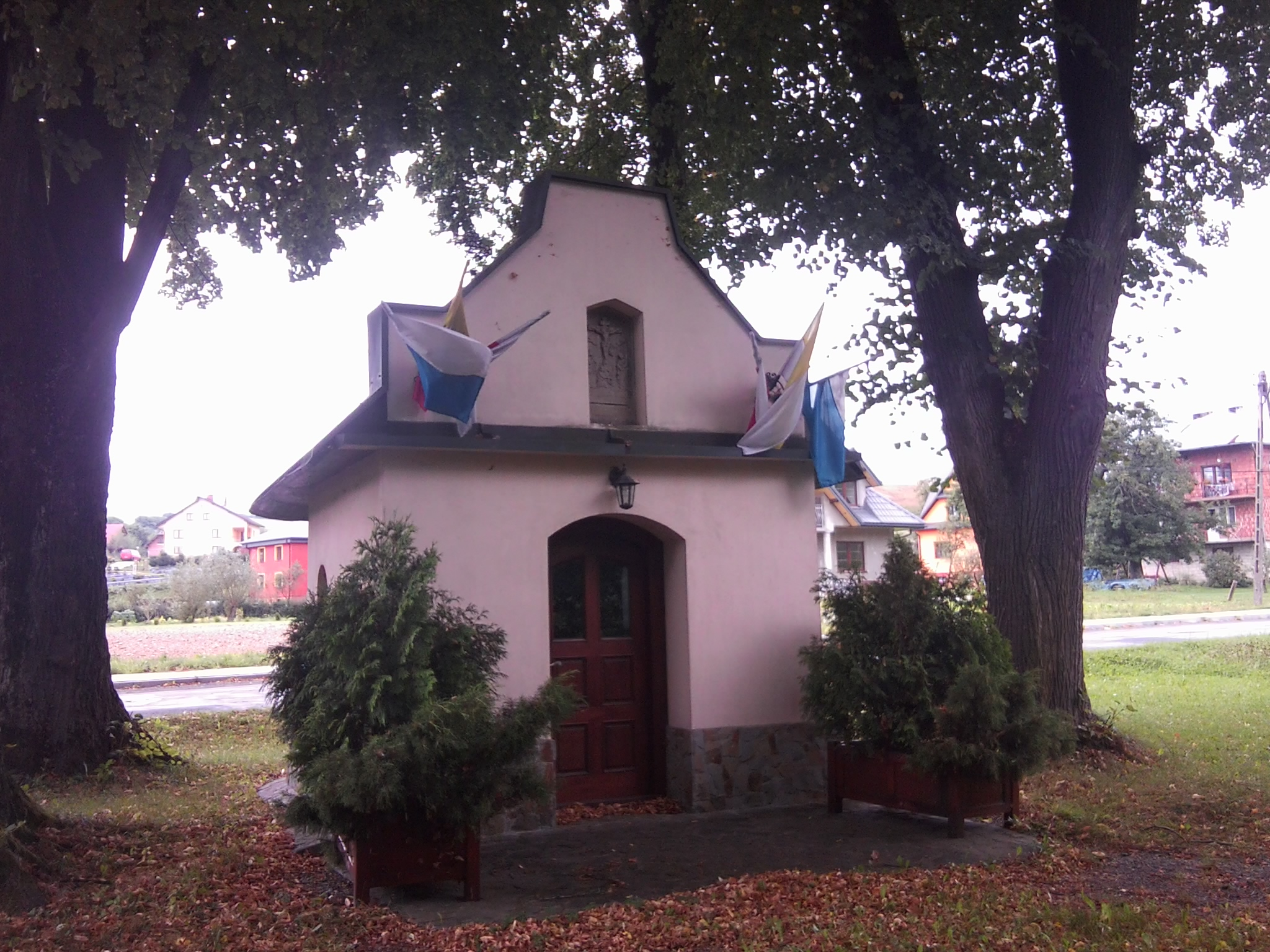 Kaplica Nawiedzenia Najświętszej Maryi Panny w Długołęce-Świerkli